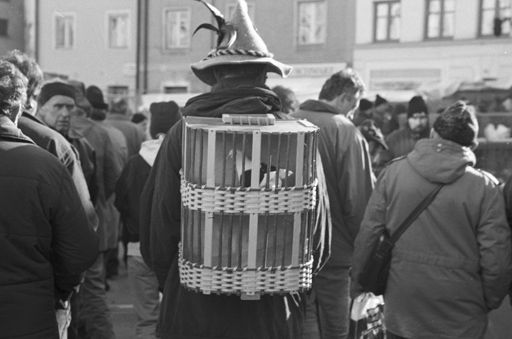 Taubenmarkt in Wasserburg am Inn, 1996